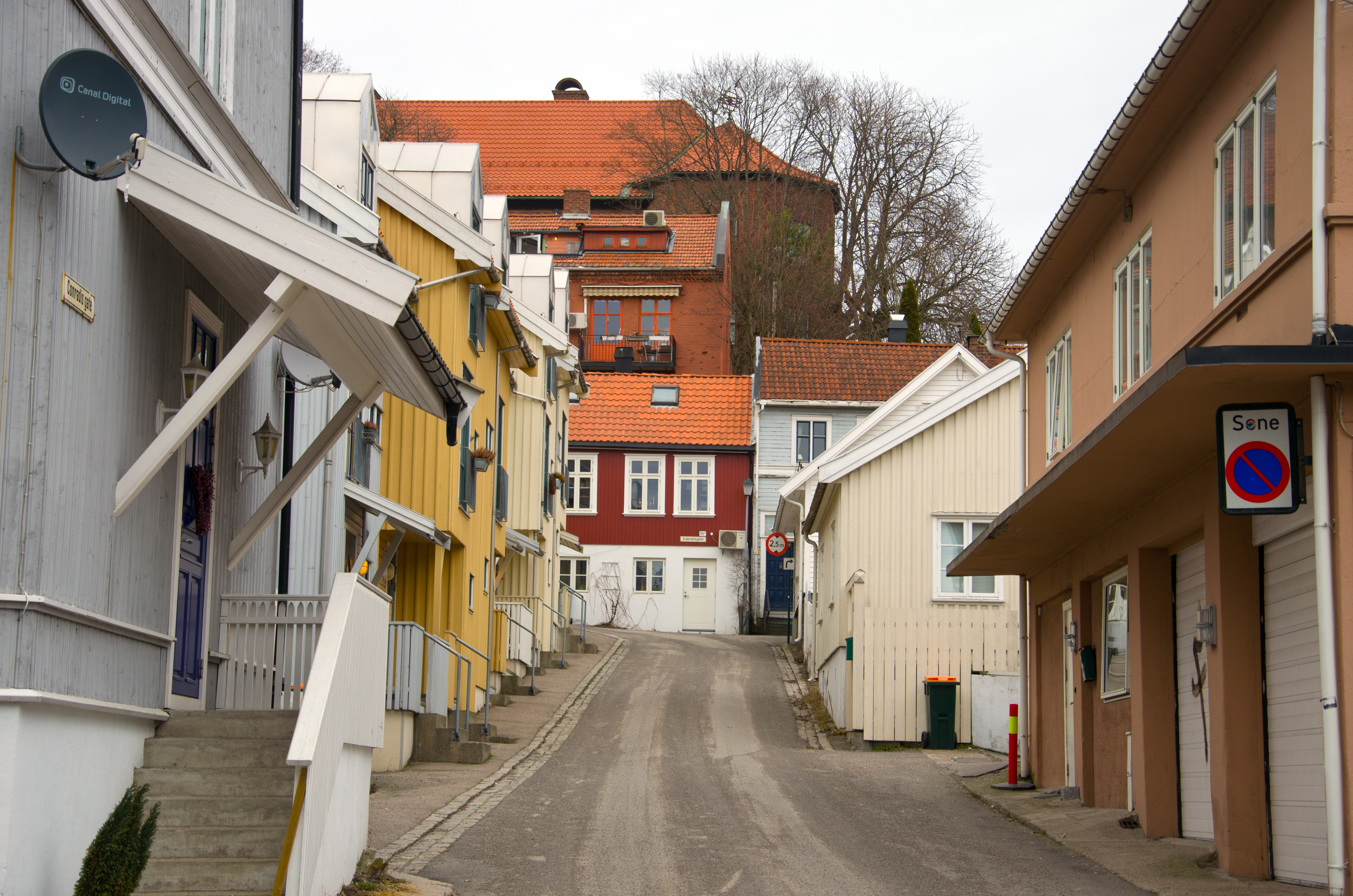 Conradis gate, Tønsberg